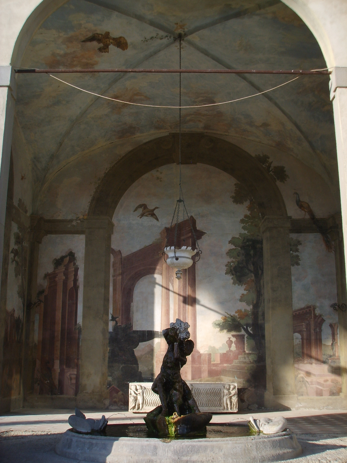 Villa guicciardini corsi salviati, affreschi